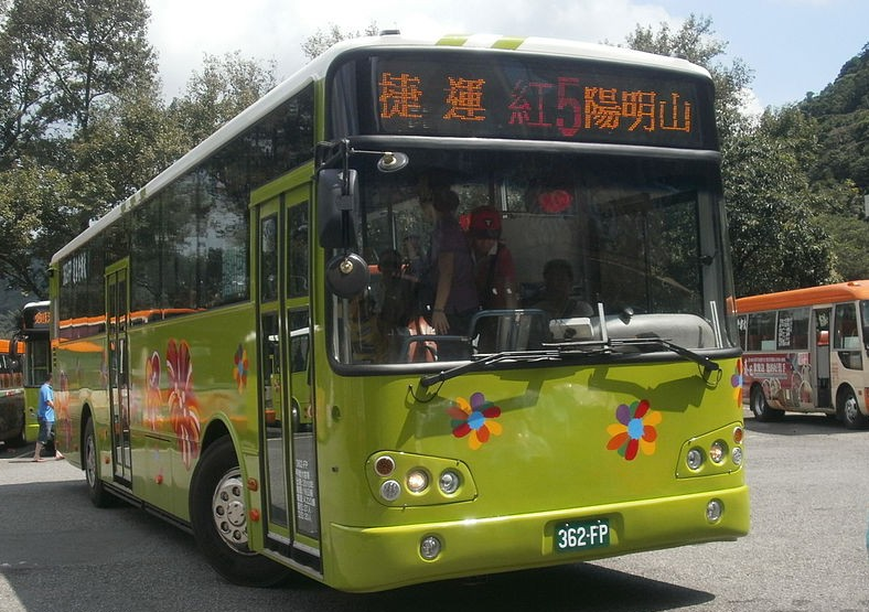 大都會客運的韓國大宇BC211MA新車